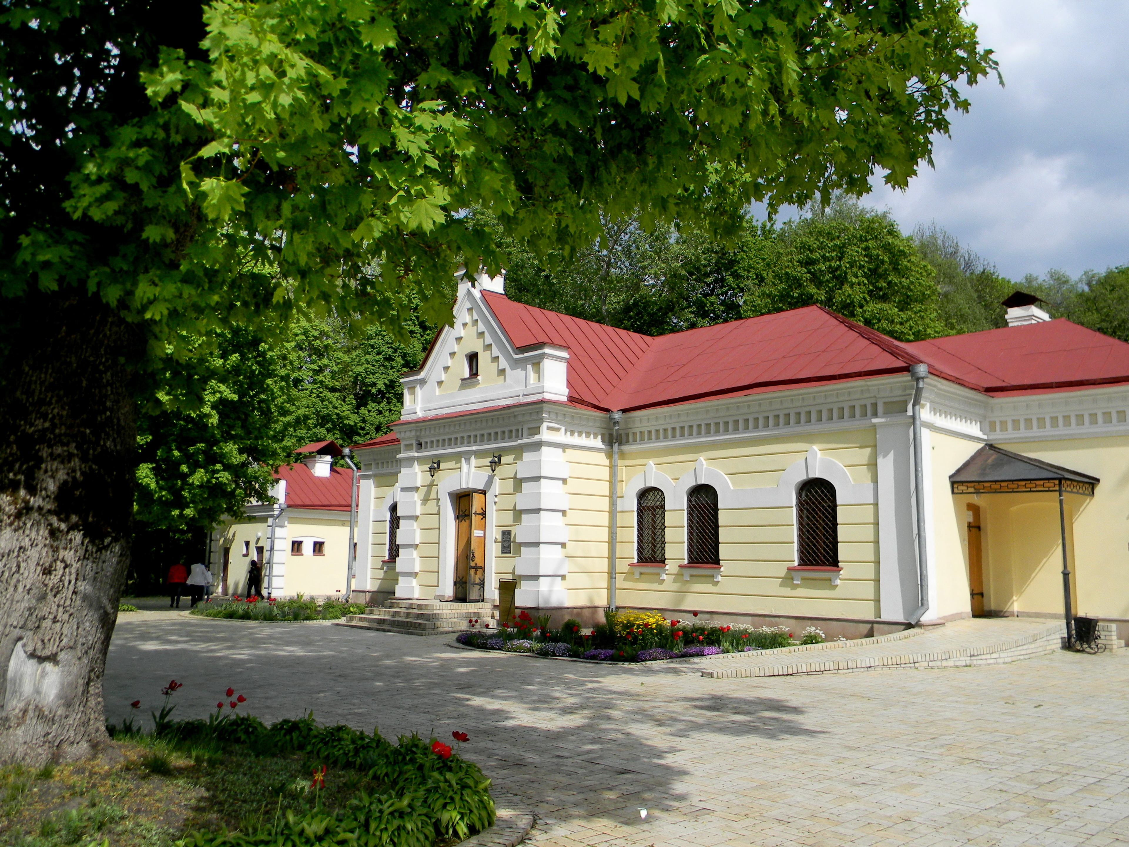 Кочубеївський, Бахмацький район, смт. Батурин